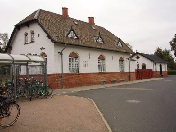 Herfølge station gadeside (østfacade)